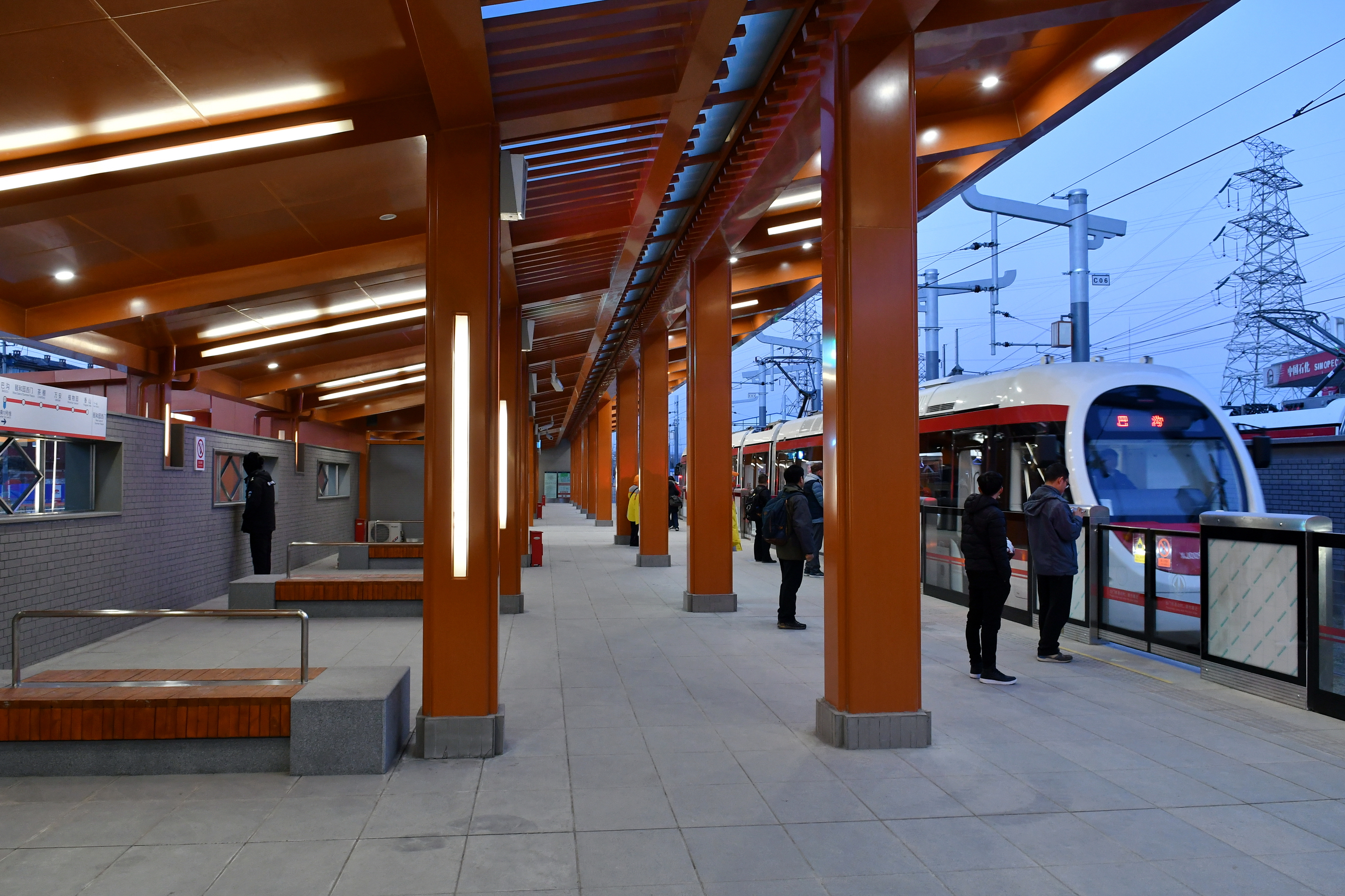 北京地铁西郊线巴沟站站台